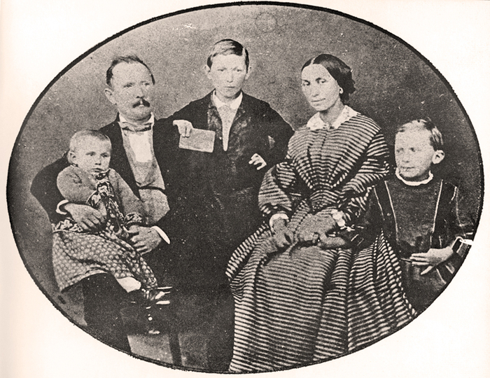 Diese leider nur gering aufgelöste Wiedergabe einer Fotografie aus der Urheberschaft der Familie um Ferdinand Tellgmann aus den 1860er Jahren (möglicherweise zeigt den Maler, Daguerreotypie-Pionier, Porträt-Fotografen und Begründer der Fotografen-Dynastie Tellgmann mit seiner Ehefrau Cäcilie, geborene Bregazzi (eine Schwester des Fotografen Christian Bregazzi) und drei ihrer Kinder ...